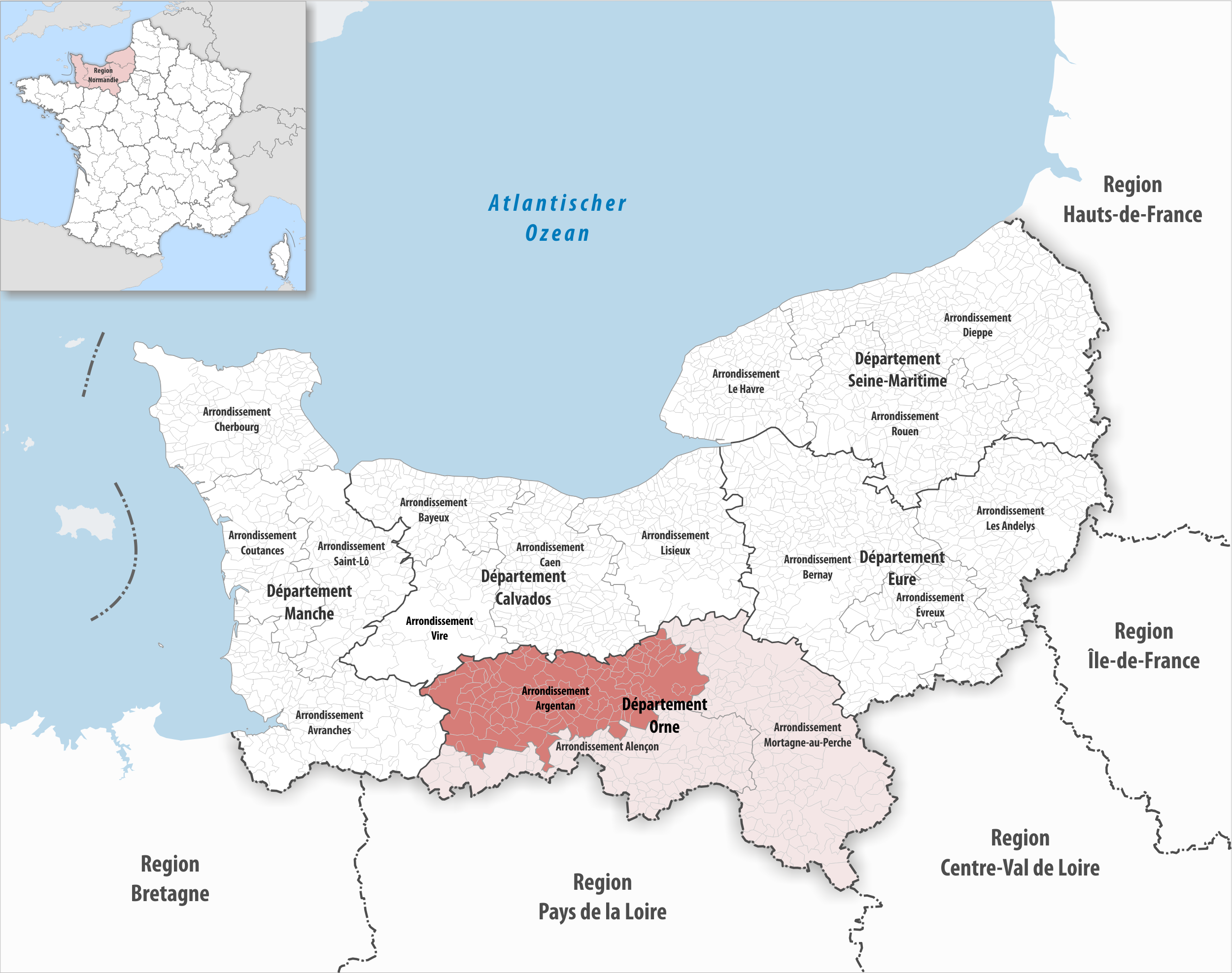 Lage des Arrondissements Argentan